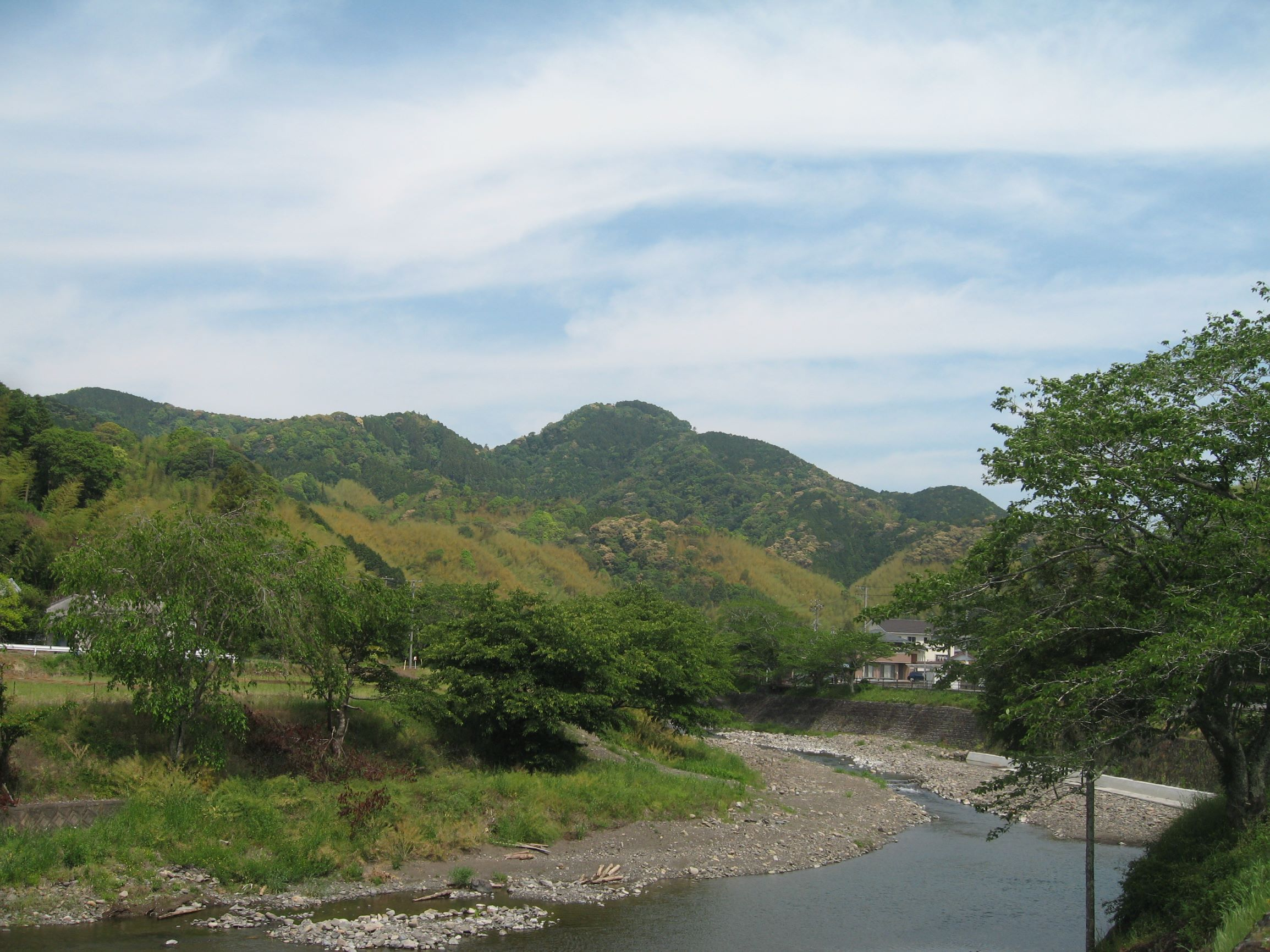 藤枝市岡部町新舟付近から見た宮島城跡（写真中央の三角山）